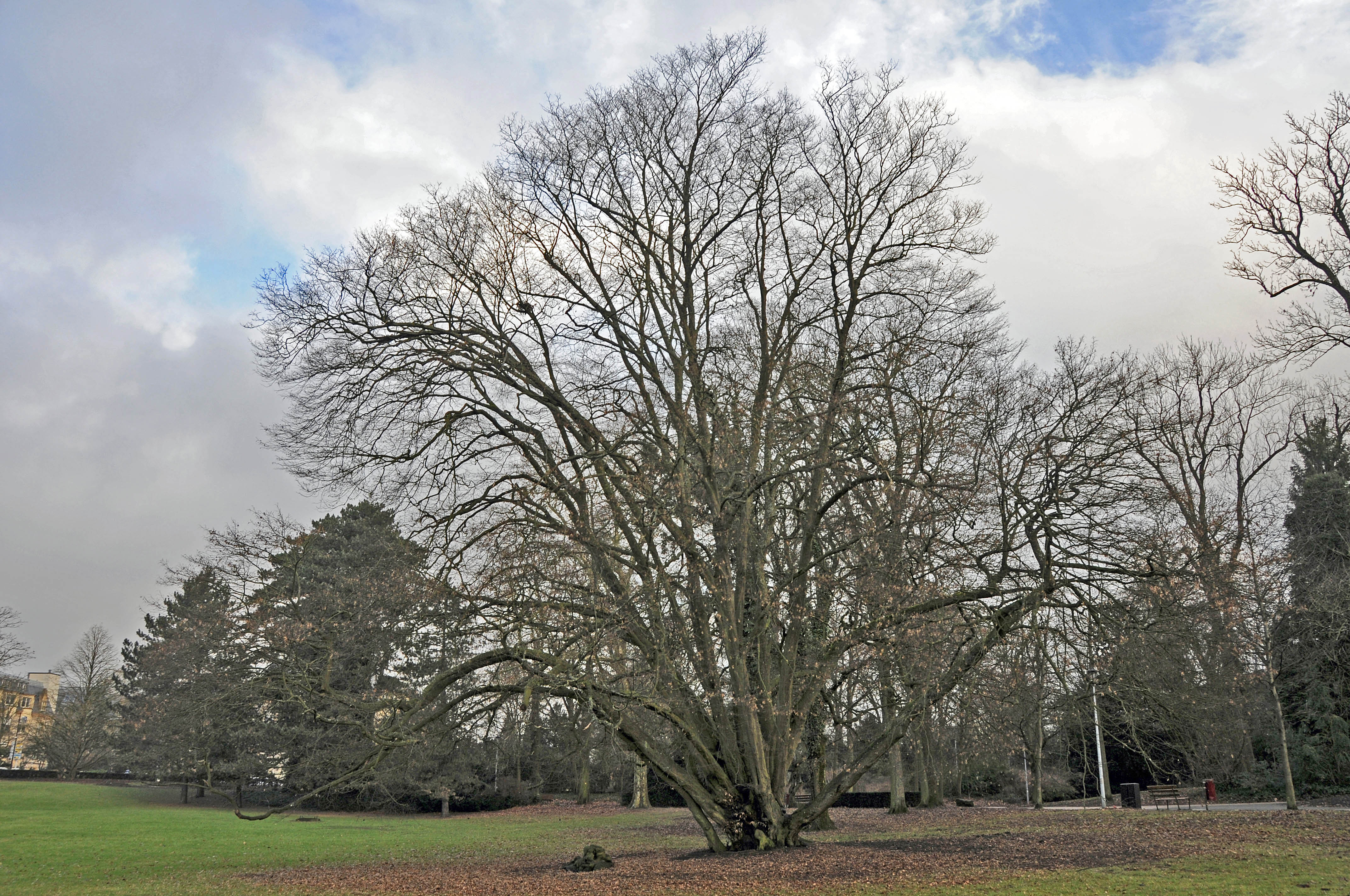 Hobuch op der Kinnekswiss